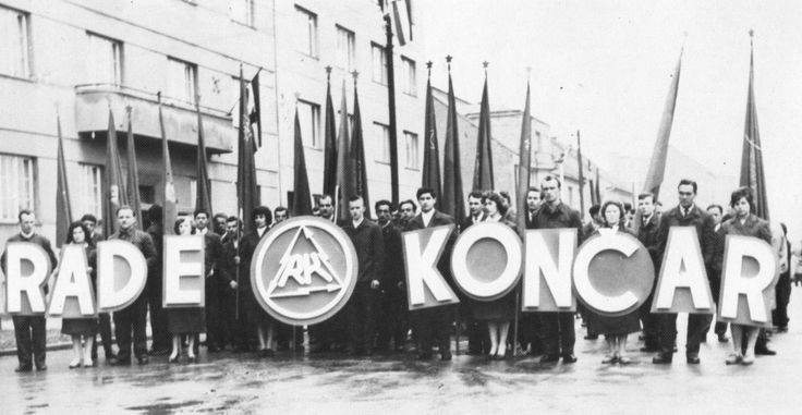 Srpskohrvatski / српскохрватски: Radnici tvornice Rade Končar na čelu prvomajske kolone, 1960.